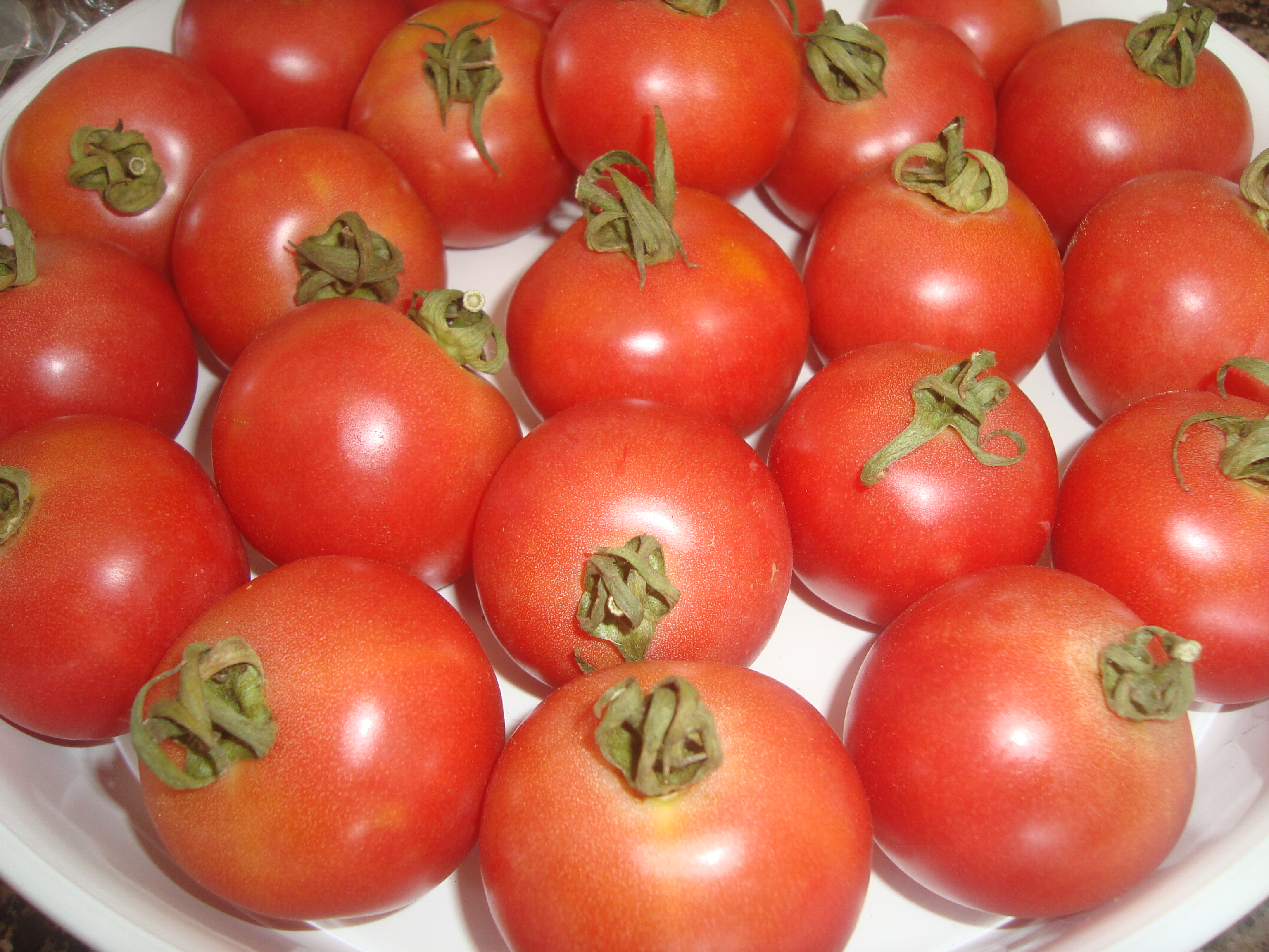 Els tomàquets de penjar són una de les varietats de tomàquet que pot conservar-se fresc i sucos durant diversos mesos, després d'haver-los recollit de la mata, el mètode consisteix en penjar els tomàquets en un lloc sec i fresc. Els llauradors de les regions de València i Catalunya són els majors productors de tomàquet de penjar.